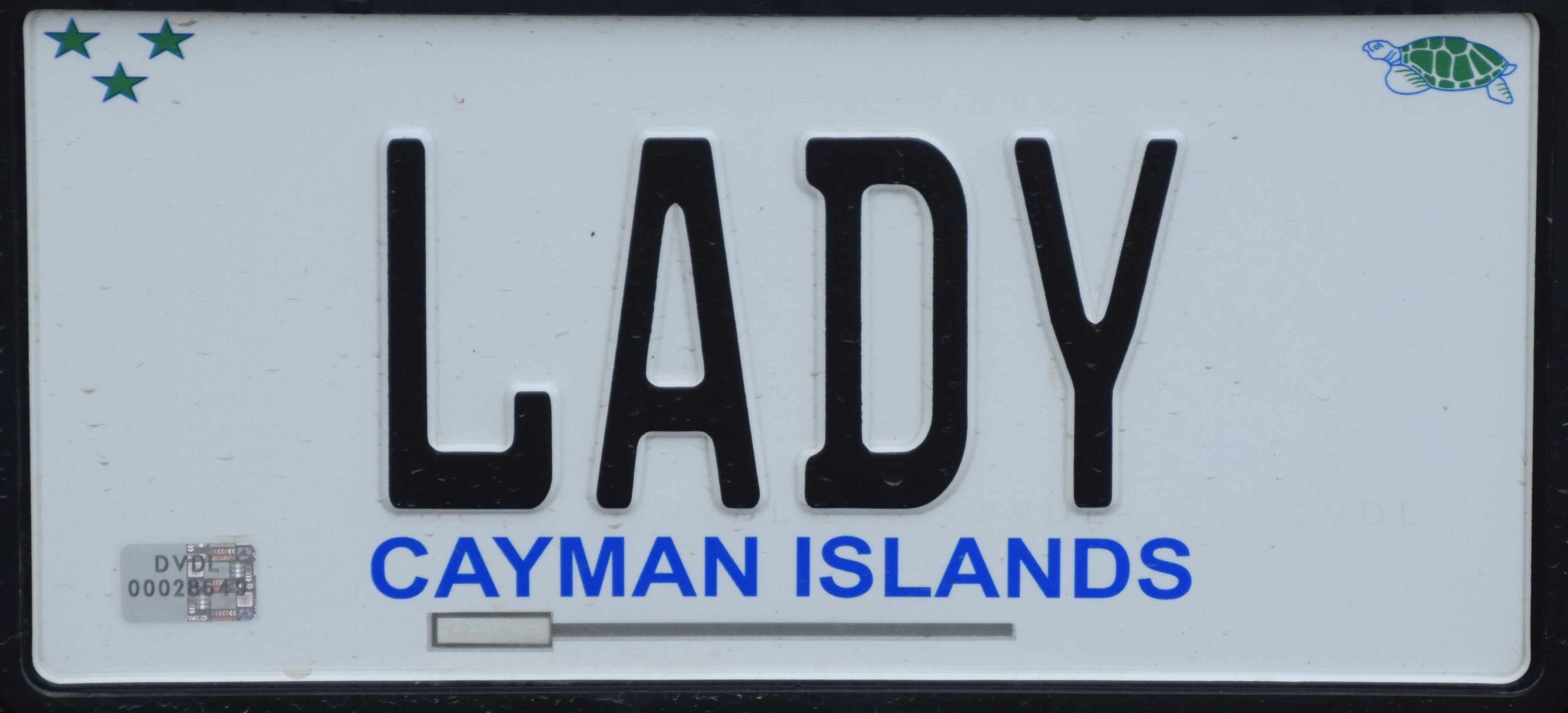 kenteken plaat van de Cayman Islands